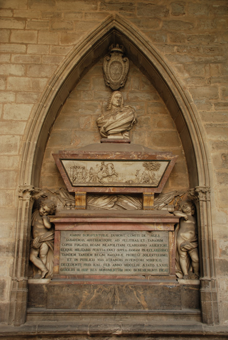 gages